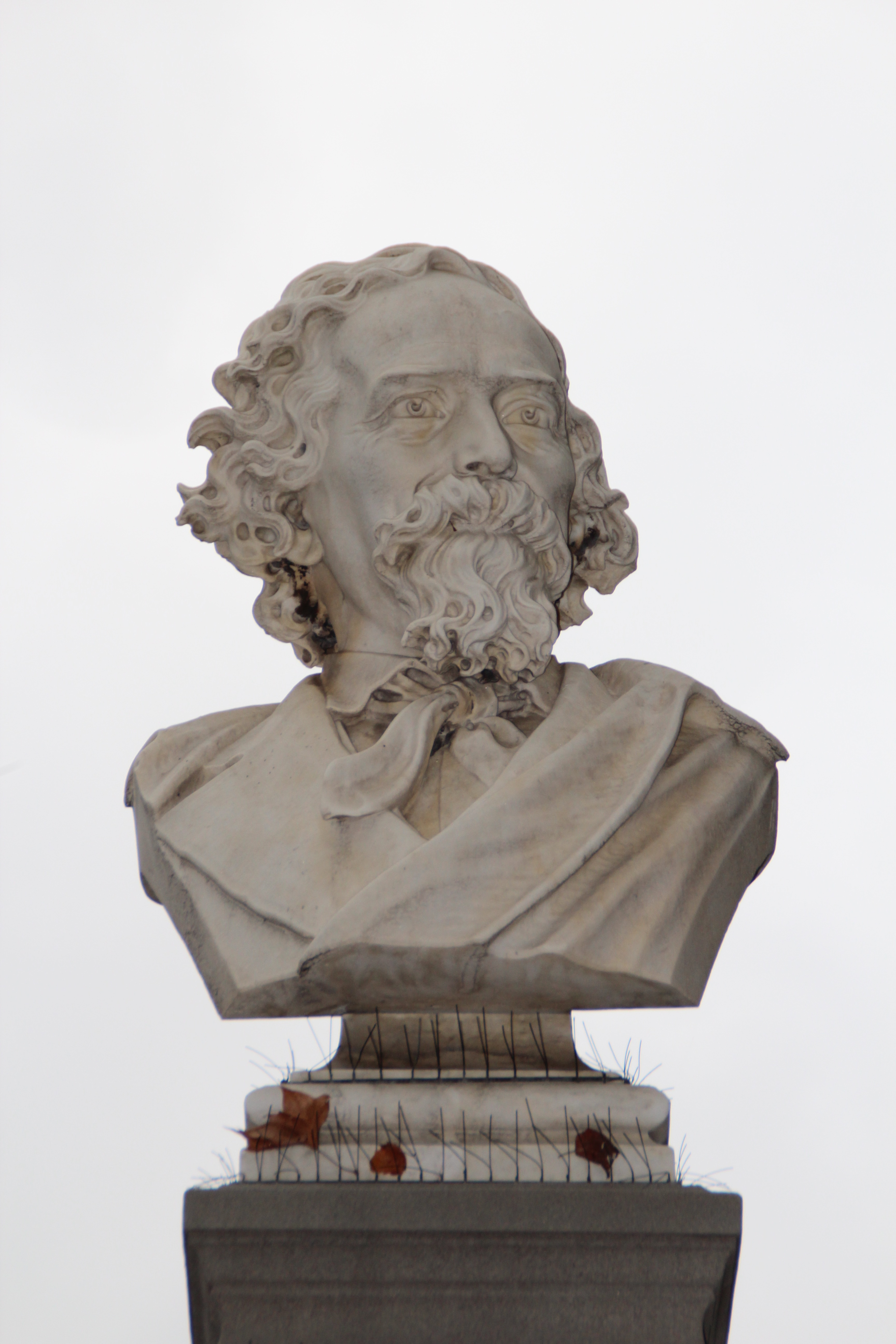 Denkmalde:Ignaz Heim am Heimplatz, bzw. Pfauen